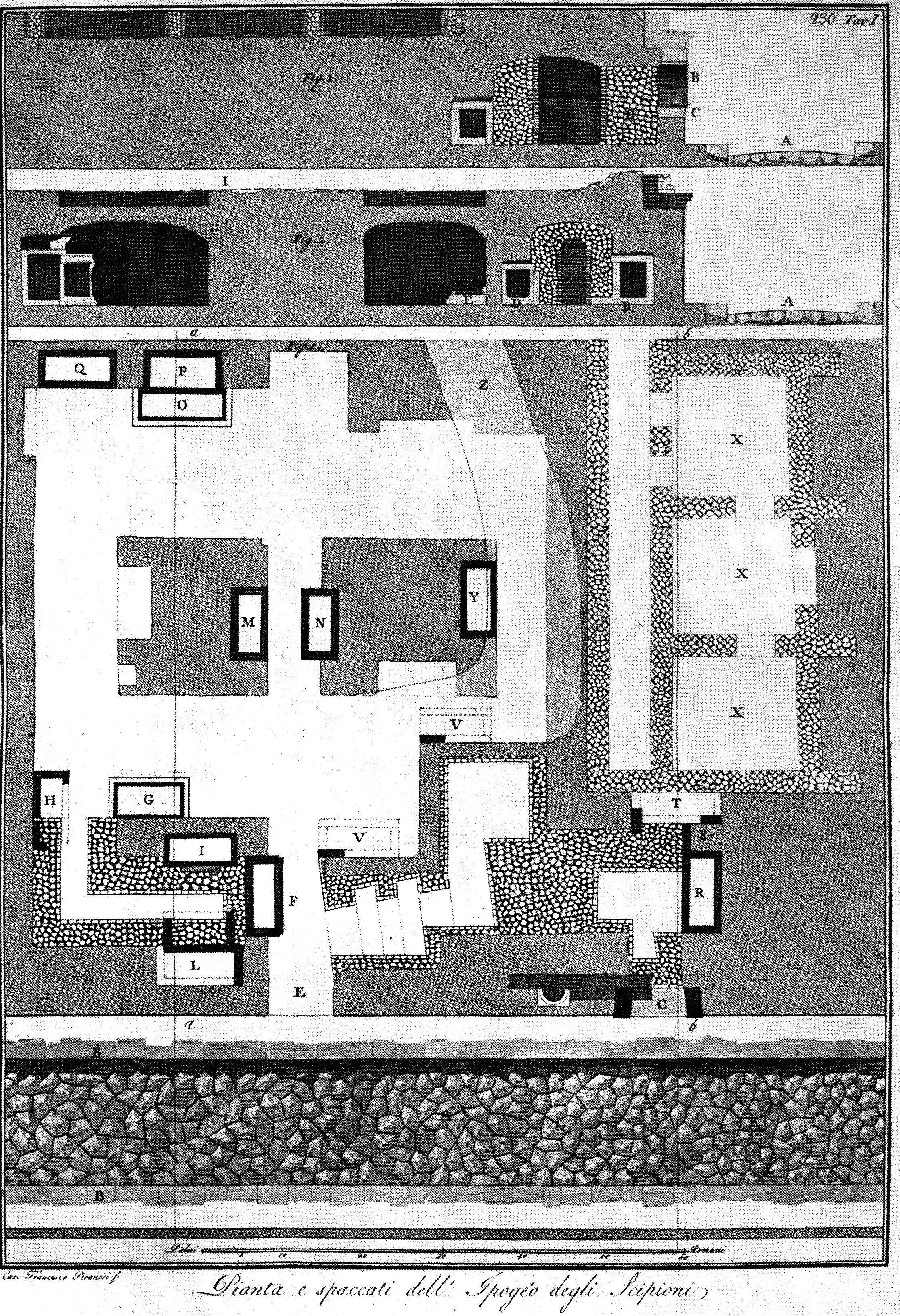 Grundriss des Scipionengrabes